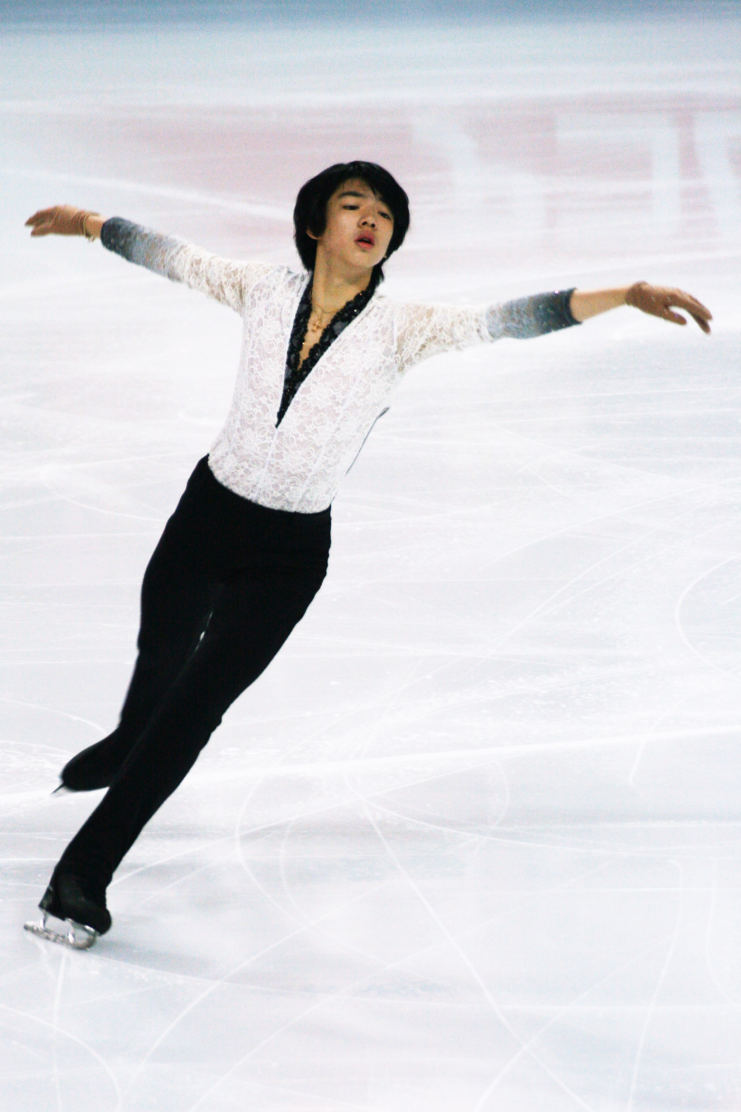 Ча Чжун Хван (Республика Корея) на финале Гран-при по фигурному катанию среди юниоров 2016-2017